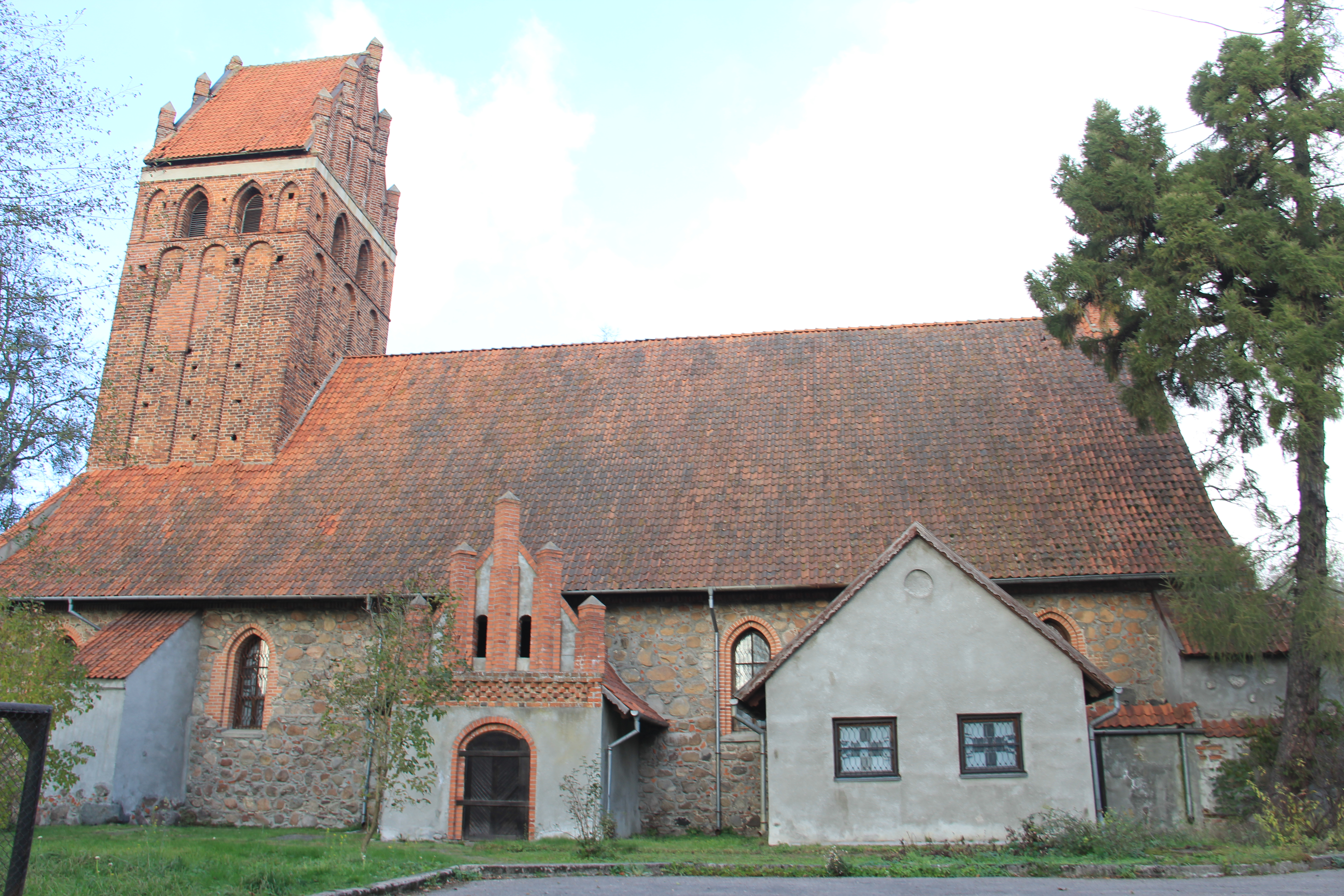 Приходская церковь (Калиниградская область, Гурьевск, город гурьевск, заречная улица, 5)